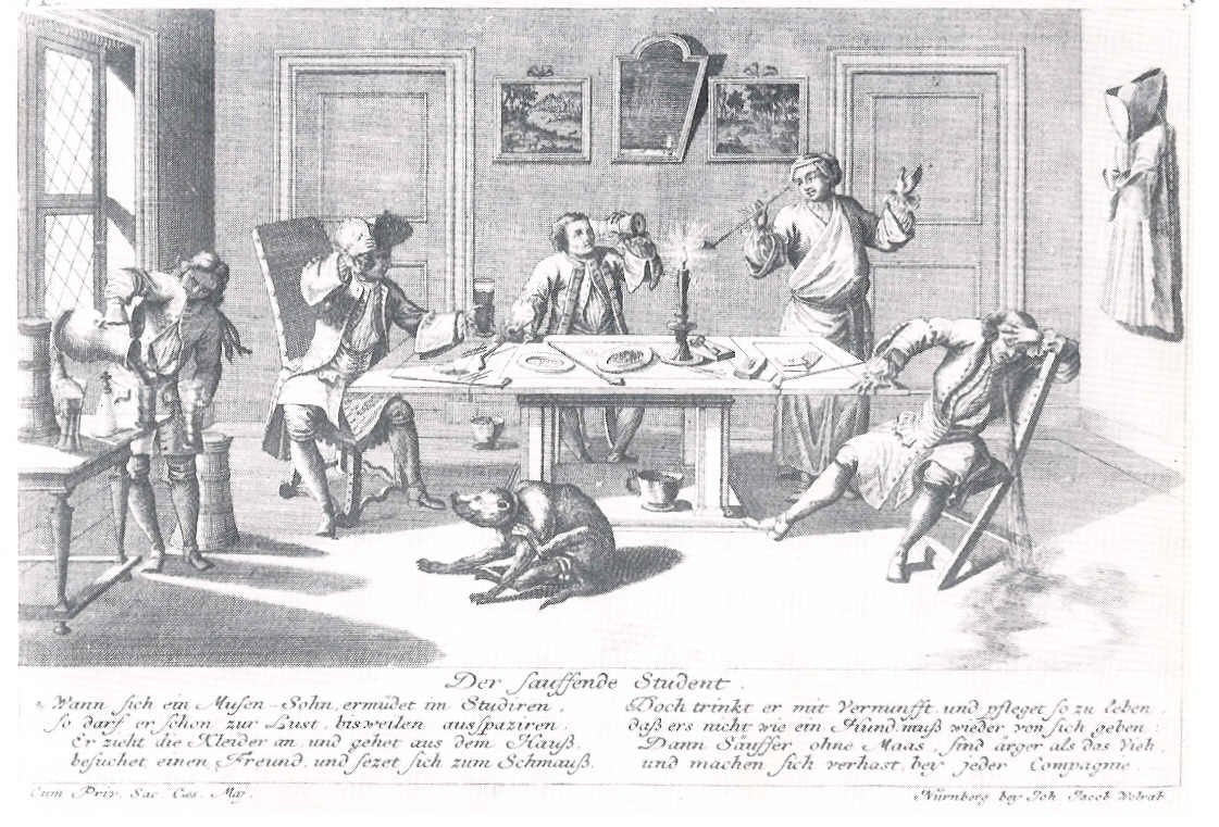 "Dendrono" (Johann Georg Puschner), "Der sauffende Student", Kupferstich von 1725, Szenen aus dem Leben der Studenten an der Universität Altdorf: Der sauffende Student Wann sich ein Musen-Sohn ermüdet im Studiren, so darf er schon zur Lust, bisweilen ausspazieren. Er zieht die Kleider an und gehet aus dem Hauß besuchet einen Freund und sezet sich zum Schmauß. Doch trinkt er mit Vernunfft und pfleget so zu leben daß ers nicht wie ein Hund muß wieder von sich geben Dann Säuffer ohne Maas, sind ärger als das Vieh und machen sich verhast bey jeder Compagnie. Rechte abgelaufen, Public Domain